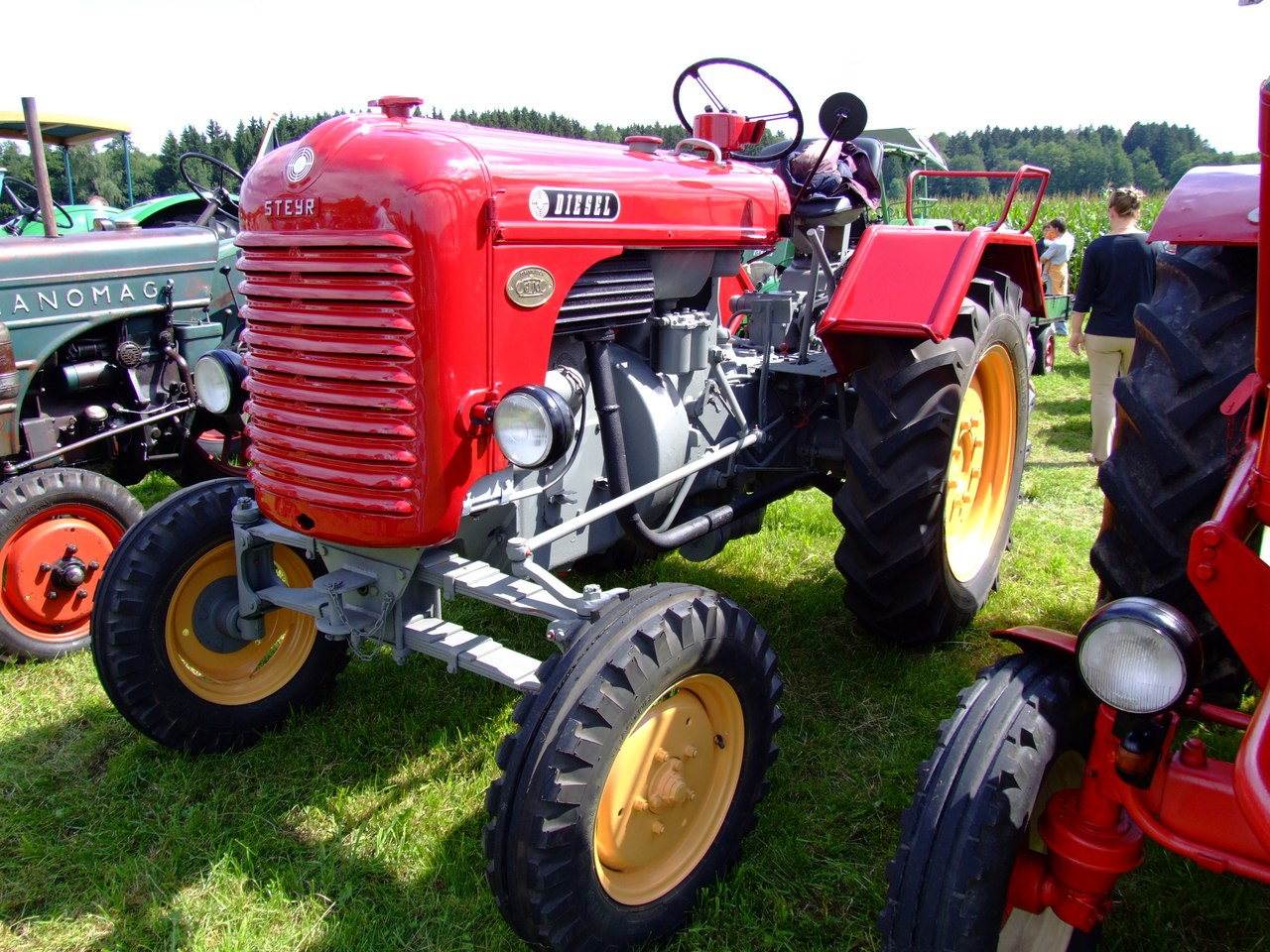 Steyr-Traktor mit 36 PS, Baujahr 1957